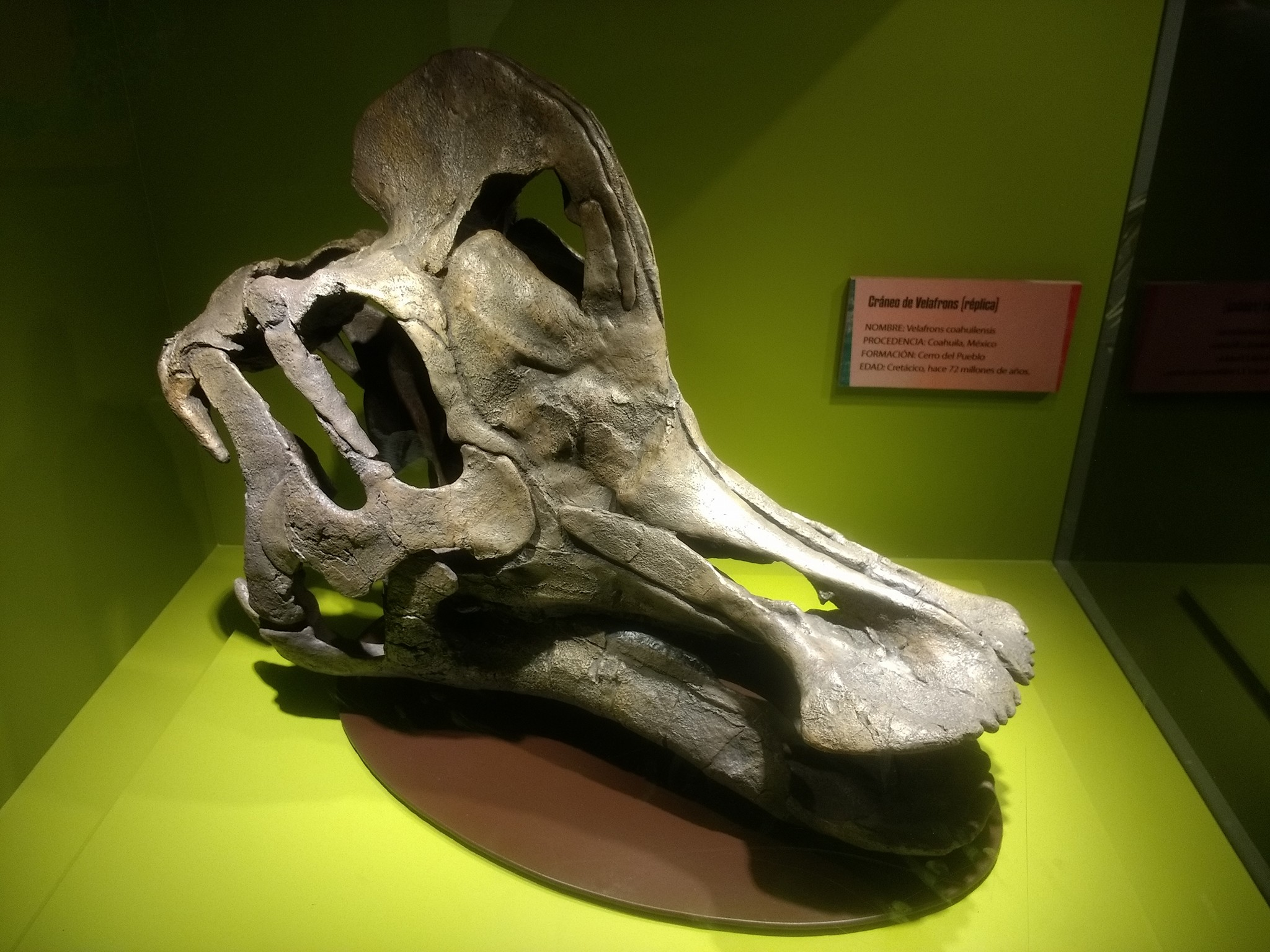 Replica de Craneo de Velafrons